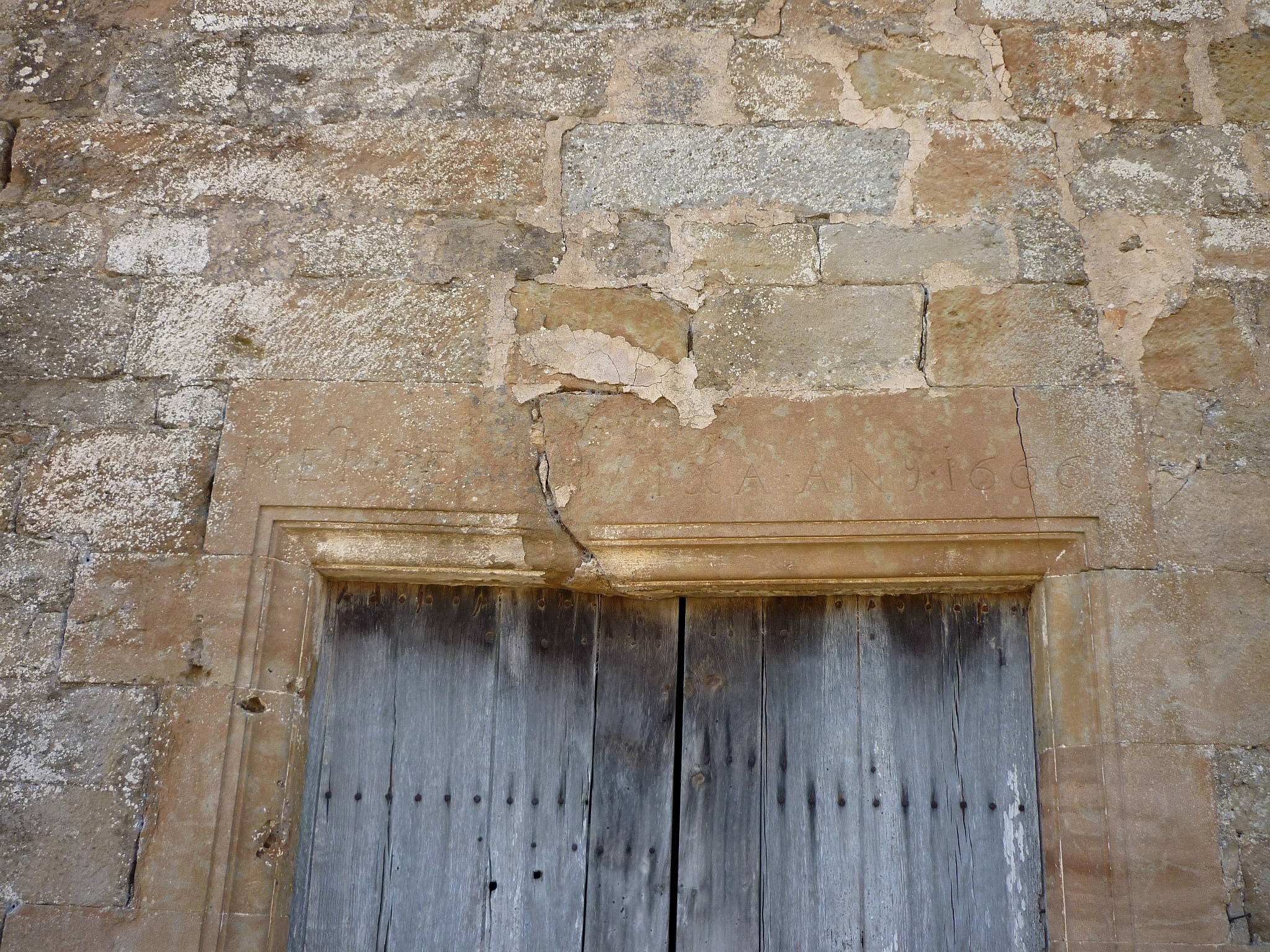 Capella de Sant Isidre de Falou (Llobera): dintell de la porta